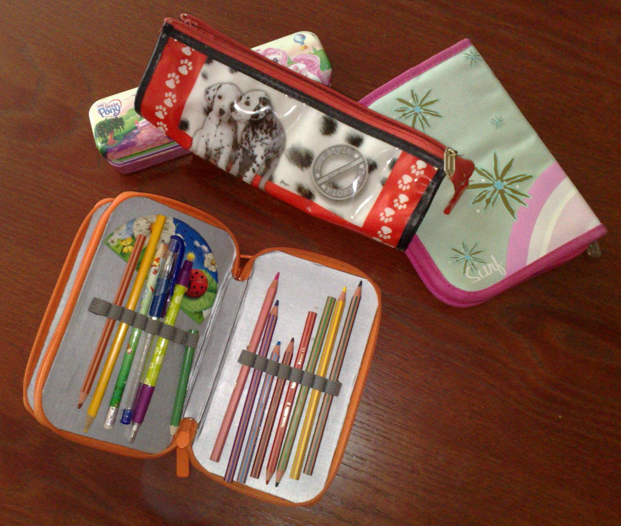 pencil cases